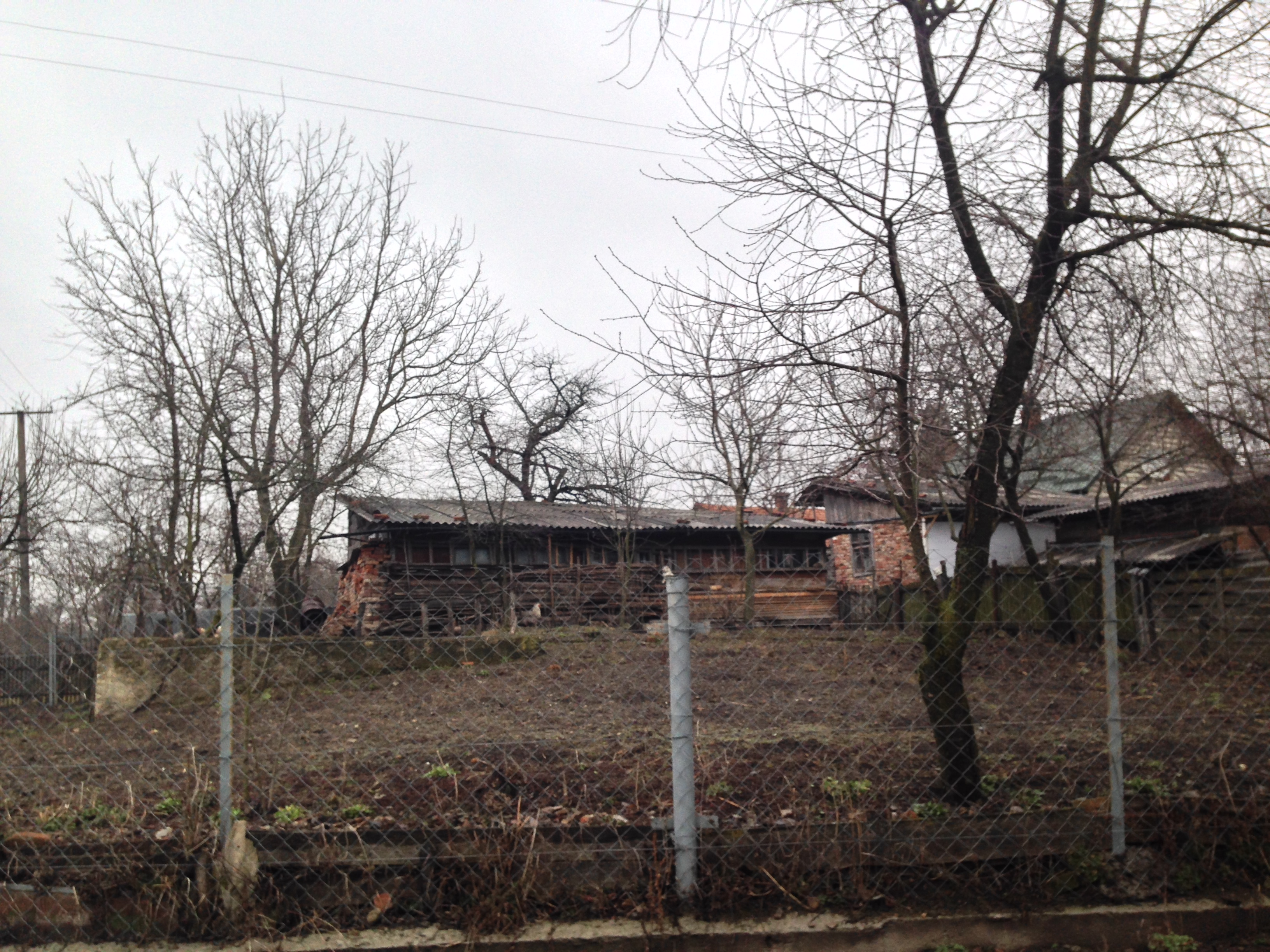 תמונה של מיקום בית הכנסת היהודי שנהרס בתקופת השואה